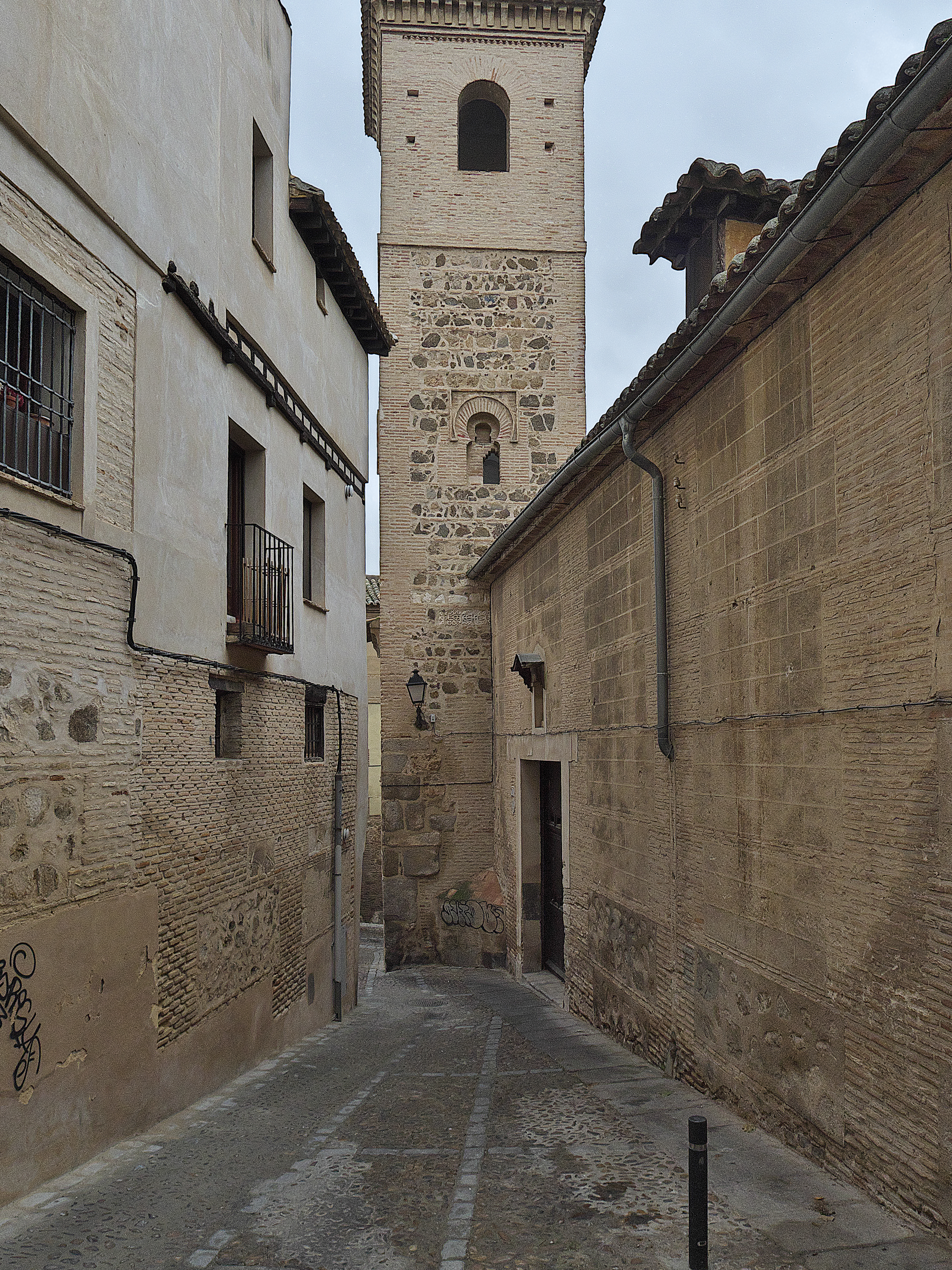 Torre mudéjar de la iglesia